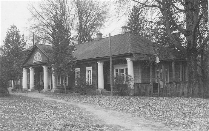 Блонская усадьба, 19 век